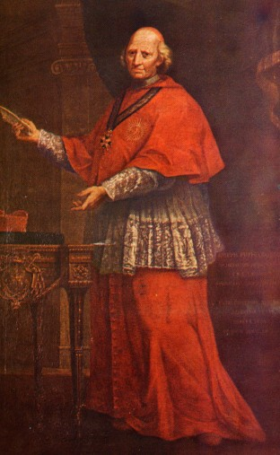 Ritratto del Cardinale Giuseppe Pozzobonelli (1696-1783)